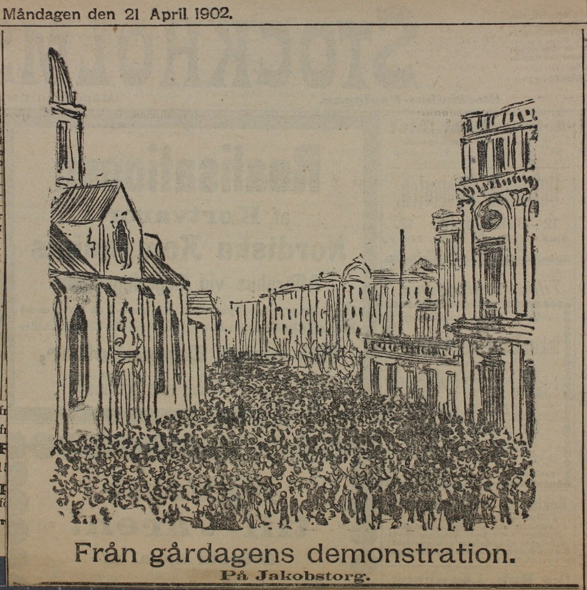 Söndagen den 20 april 1902 hölls en stor rösträttsdemonstration på Jakobstorg med uppåt 30 000 deltagare. Bråk med polisen uppstod och flera demonstranter greps. En hel del människor sårades av polisens sablar. Den här bilden publicerades i Stockholms-tidningen dagen därpå intill ett reportage om händelserna.